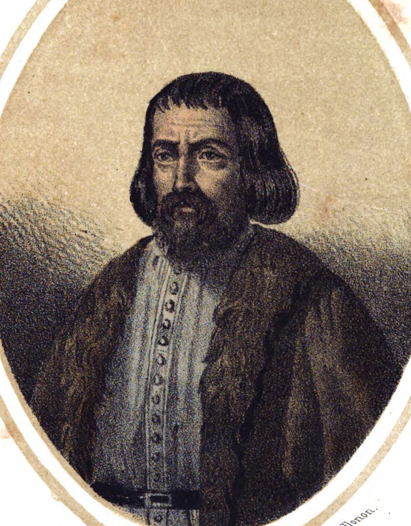 Guillen de Sorolla (Guillem Sorolla).